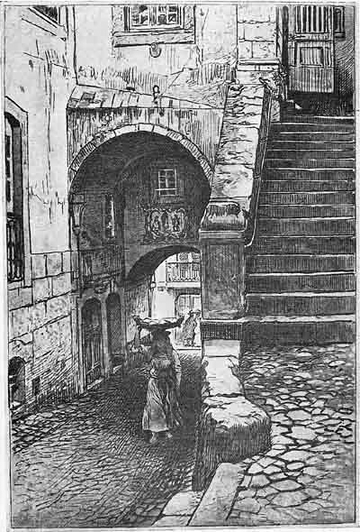 Esta imagem (em domínio público por morte do autor há mais de 75 anos) faz parte de um conjunto de 100 aguarelas e gravuras criadas em 1910-1920 e publicadas no livro Lisboa Velha (Afonso Lopes Vieira (prefácio). Anuário Comercial: Lisboa, 1925).